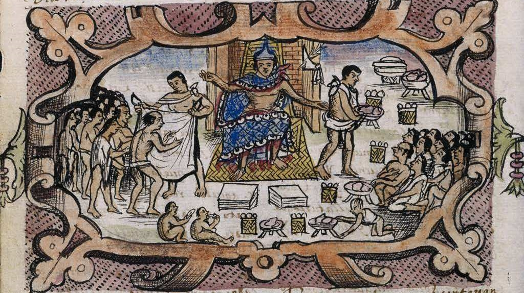 Diego Durán, Historia_de_las_Indias_de_Nueva_España_e_islas_de_la_tierra_firme (Codex Duran) f._89r: Famine relief at Tenochtitlan by Montezuma I